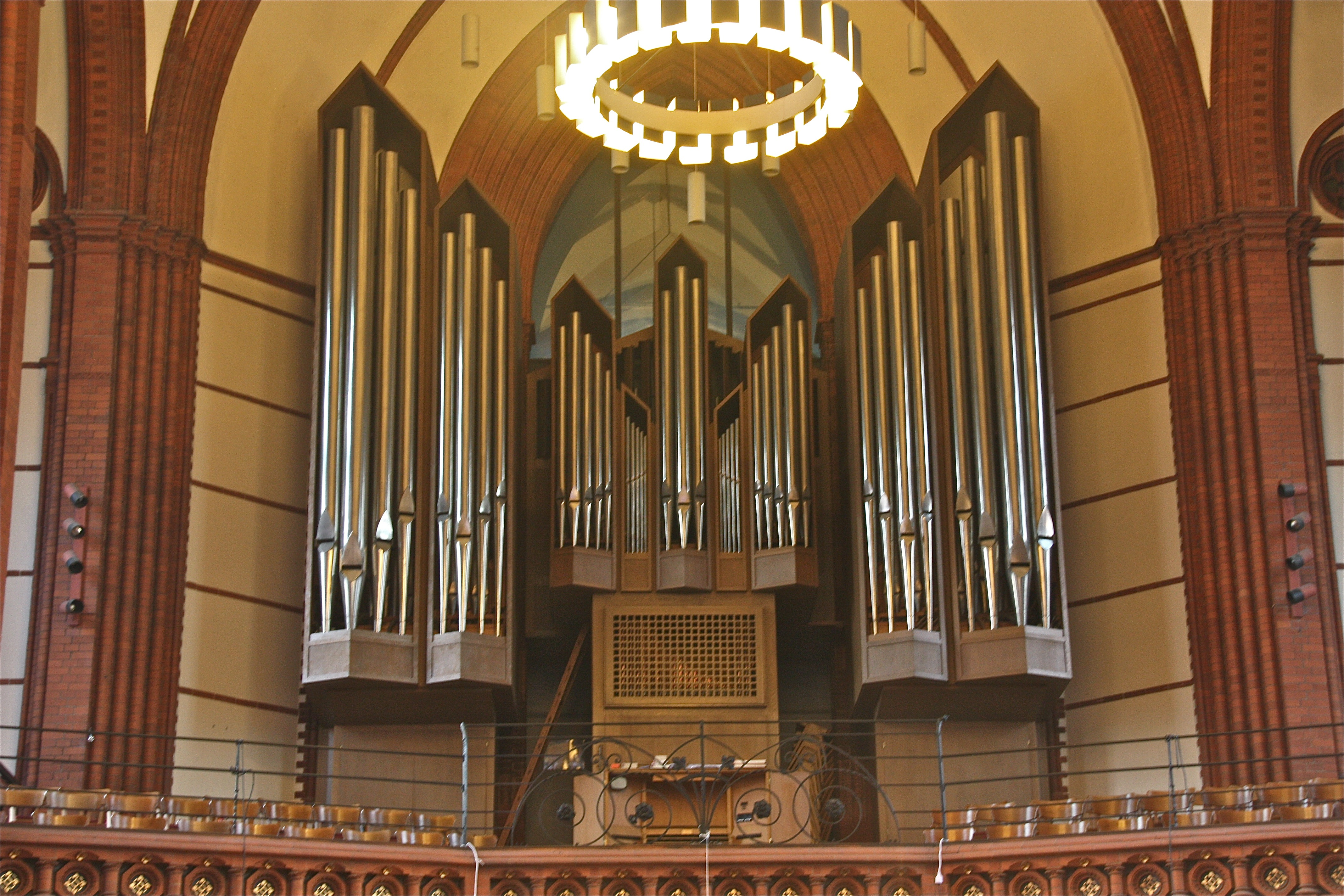 Hamburg, Uhlenhorst, Kirche St. Gertrud, Innenraum, Orgel, Führer-Orgelbau 1967